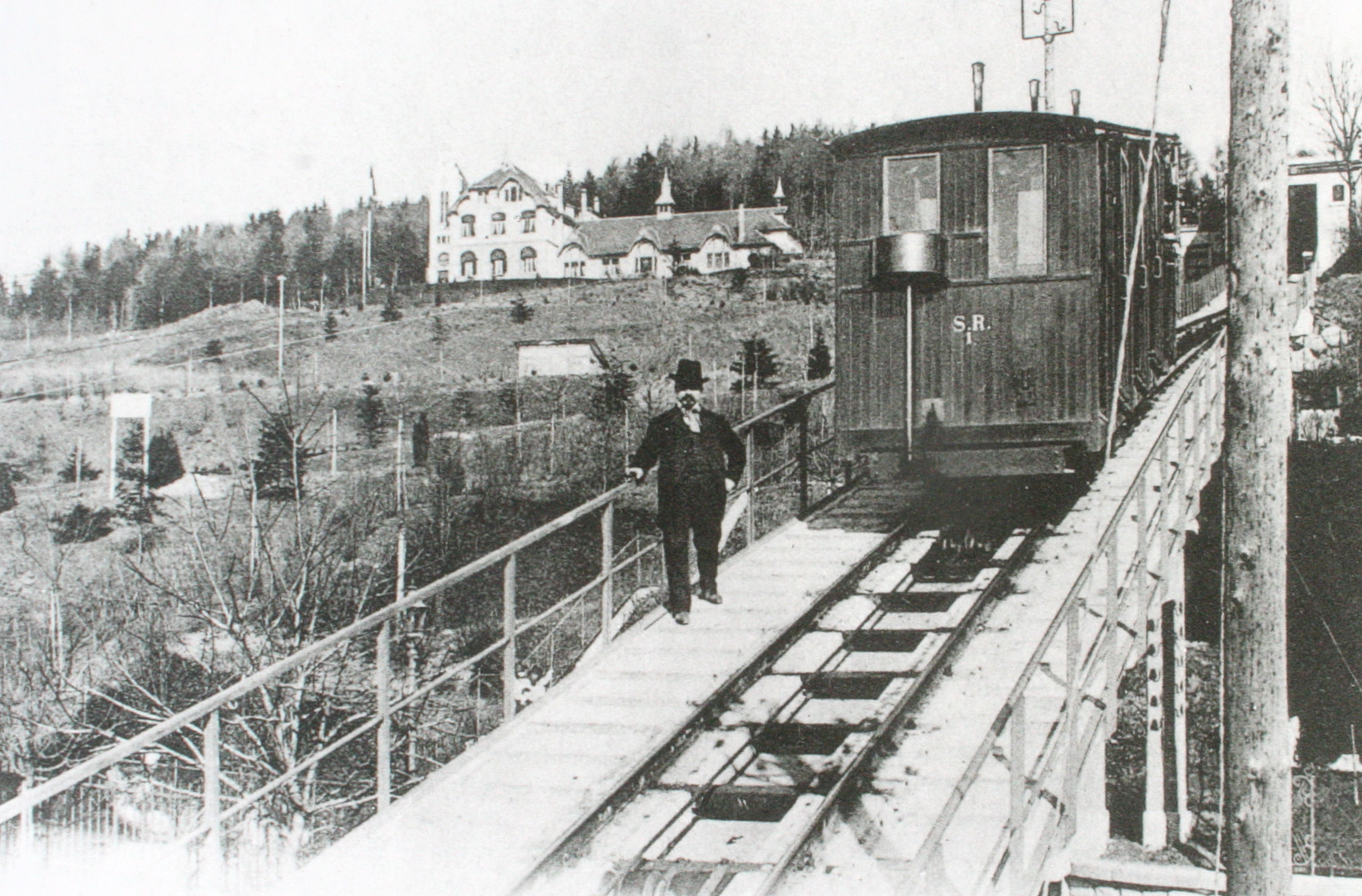 Drahtseilbahn Rigiblick 1901, Wagen auf der Hadlaubbrücke